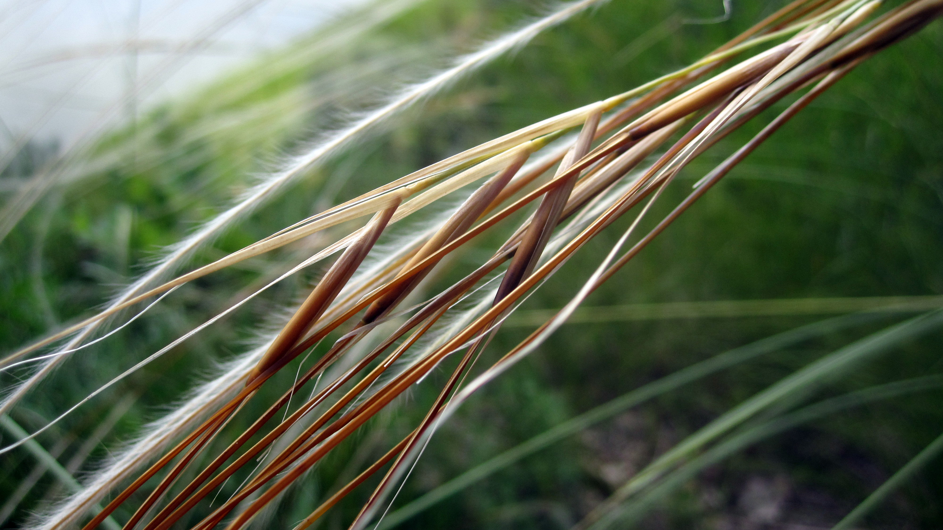 Das weltweit einzige Vorkommen des Bayerischen Federgrases Stipa pulcherrima ssp. bavarica auf einer Felsnase im Naturschutzgebiet Finkenstein, fotografiert von einem Mitarbeiter des Bayerischen Landesamts für Umwelt im Rahmen des FFH-Monitorings 2013. Der Standpunkt des Fotografen ist zum Schutz der Population und wegen Absturzgefahr für die Öffentlichkeit nicht zugänglich und durfte hier nur mit behördlicher Sondergenehmigung zur Bestandsaufnahme betreten werden.